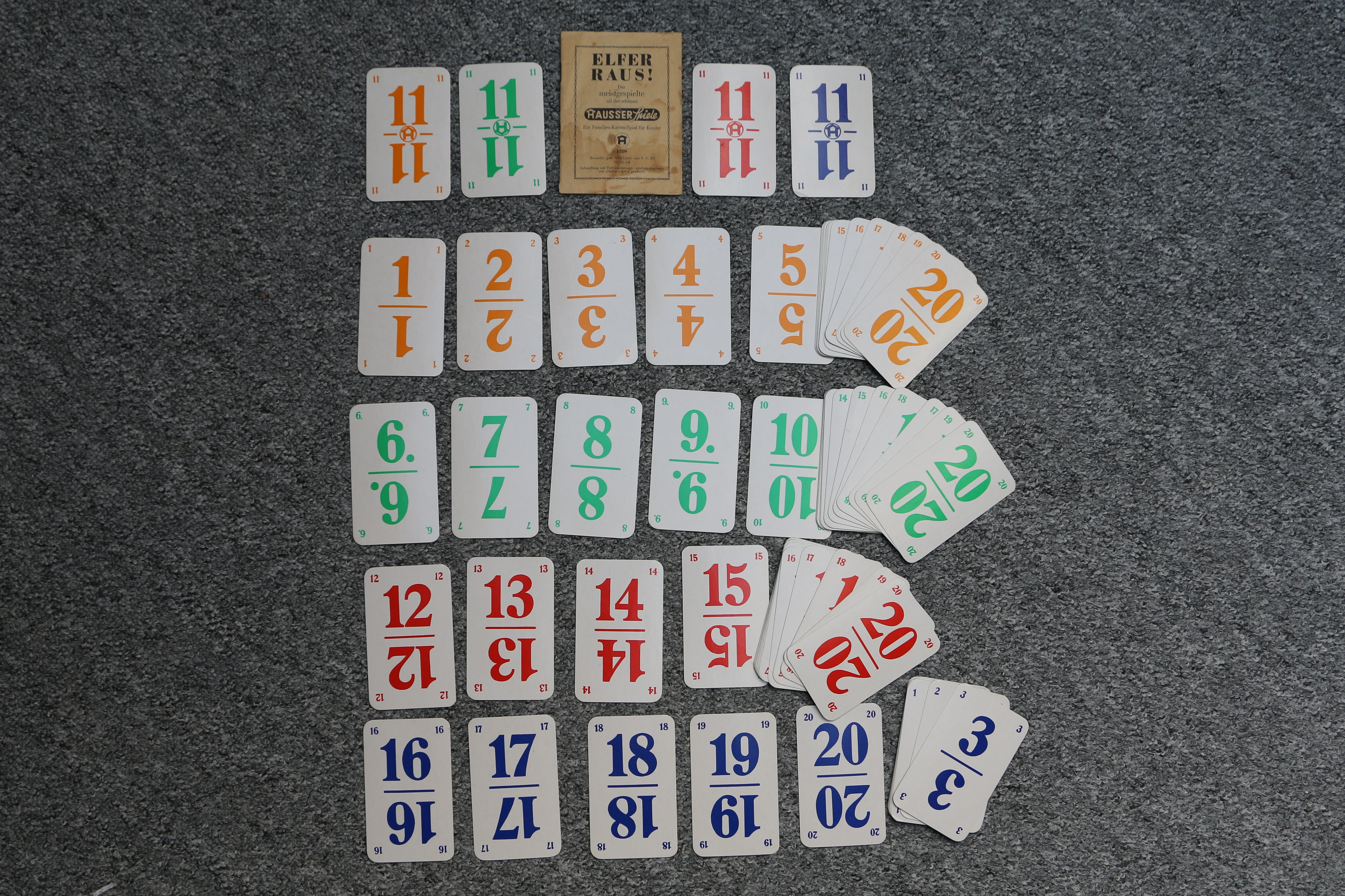 Dies sind die Karten des Spiels "ELFER RAUS !"